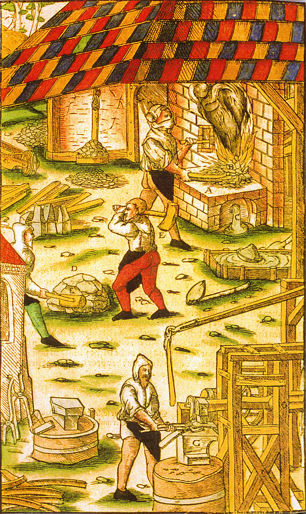 Afbeelding:Agricola hamersmidse met Rennofen.jpg Georgius Agricola: Eisenhammer mit Rennherd 1596. Public Domain